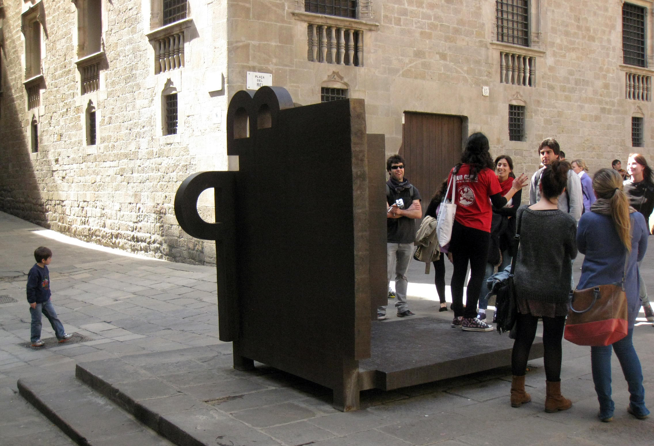 Topos V (Eduardo Chillida). Pl. del Rei (Barcelona)